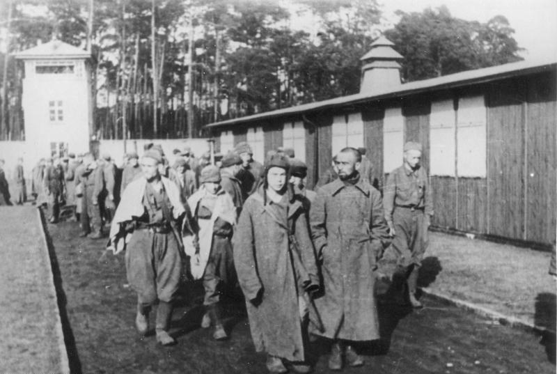 ADN-ZB 1.9.71 / DDR Faschistischer Massenmord ohne Sühne-BRD schützt Mörder. - 18.000 sowjetische Kriegsgefangene wurden 1941 nach einem dreimonatigen Marsch quer durch Deutschland im KZ-Sachsenhausen vor der SS bestialisch ermordet. Vor der Genickschussanlage, in der Gaskammer, im Experimentierraum und an anderen Orten der Grausamkeit verlosch das Leben ausgemerkelter, noch ungebrochener sowjetischer Menschen. Der ehemalige Lagerälteste und politische Häftling Harry Neujocks berichtete: "Wir waren schon viel gewohnt und hatten viel Schlimmes gesehen. Aber Menschen in solch einem Zustand waren mir bisher noch nicht begegnet. Durch den Hunger völlig heruntergekommen, sahen junge 17-18-jährige Burschen wie Greise aus. Wasser in den Beinen, die bis zur Hüfte zur Unförmigkeit angeschwollen waren, monatelang vernachlässigte Wunden, mit irgendeinem schmutzigen Lappen bedeckt. Einem jungen Burschen war der ganze Oberschenkel bis zum Knie abgefault, eine schwarze stinkende Masse..."